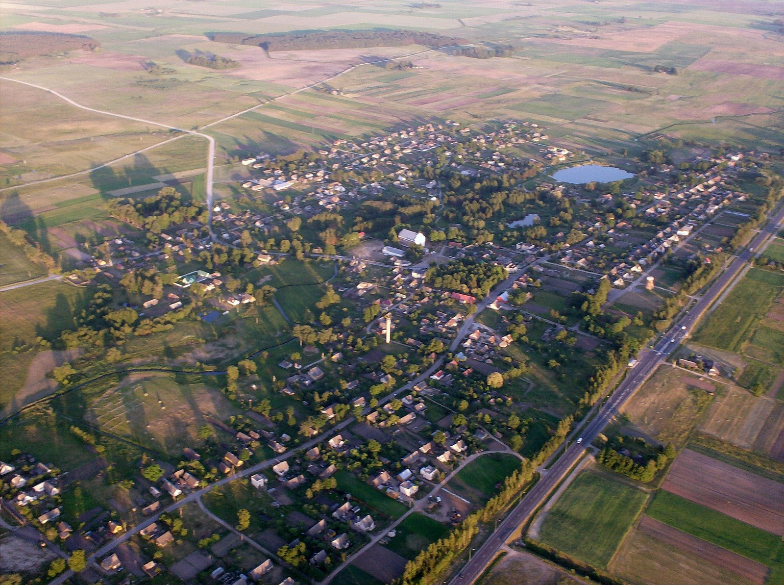 Pumpėnai. Fotografuota 2008-06-08. Autorius as.